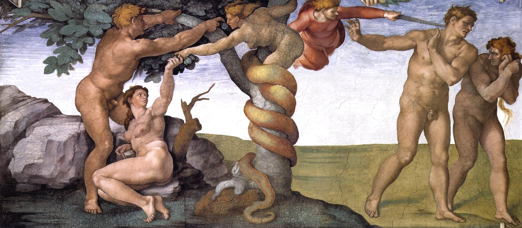 Sistine Chapel, fresco Michelangelo